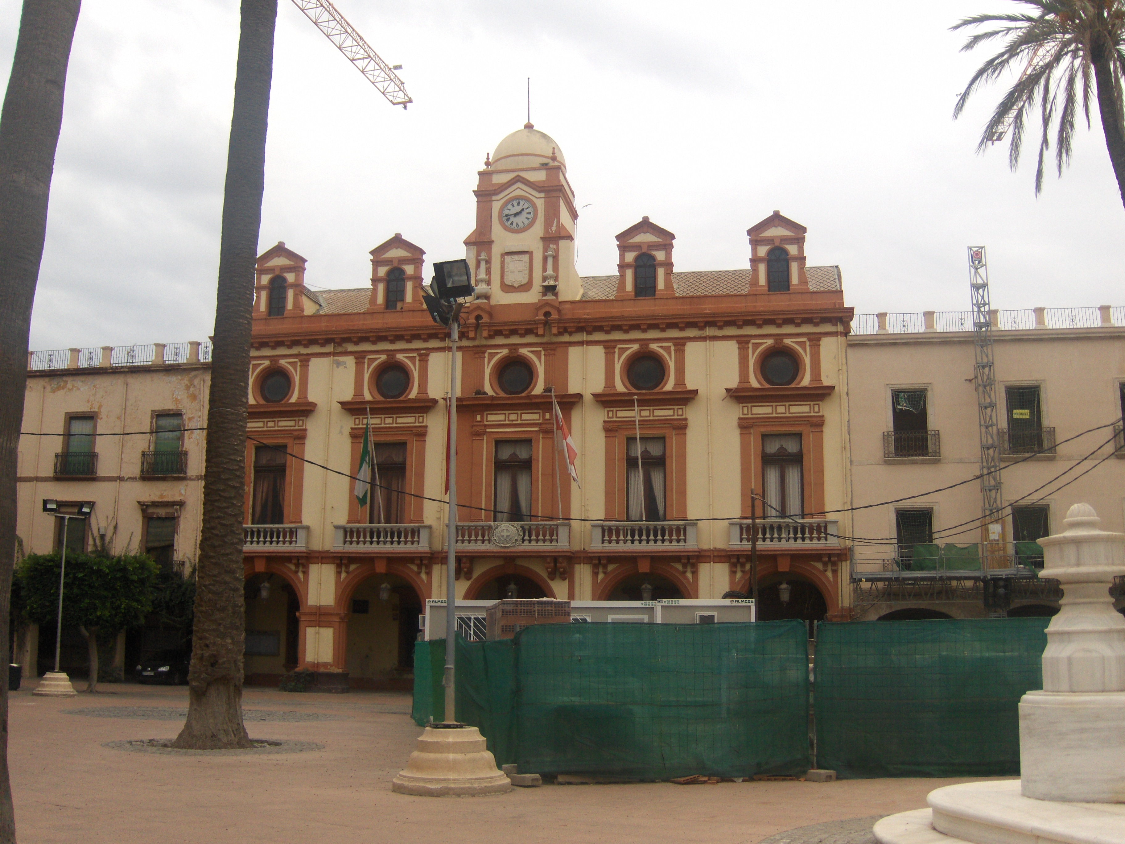 Ayuntamiento de Almería, actualmente bajo reformas